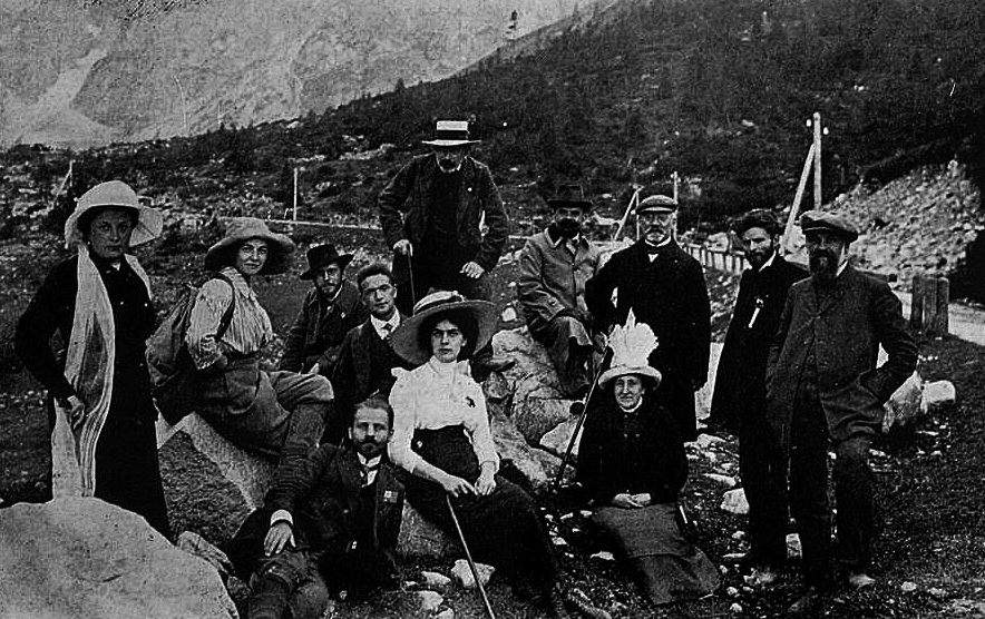 UK 1912 en Krakovo, 1912. Ekskursanoj al Zakopane dumvoje al Morskie Oko.